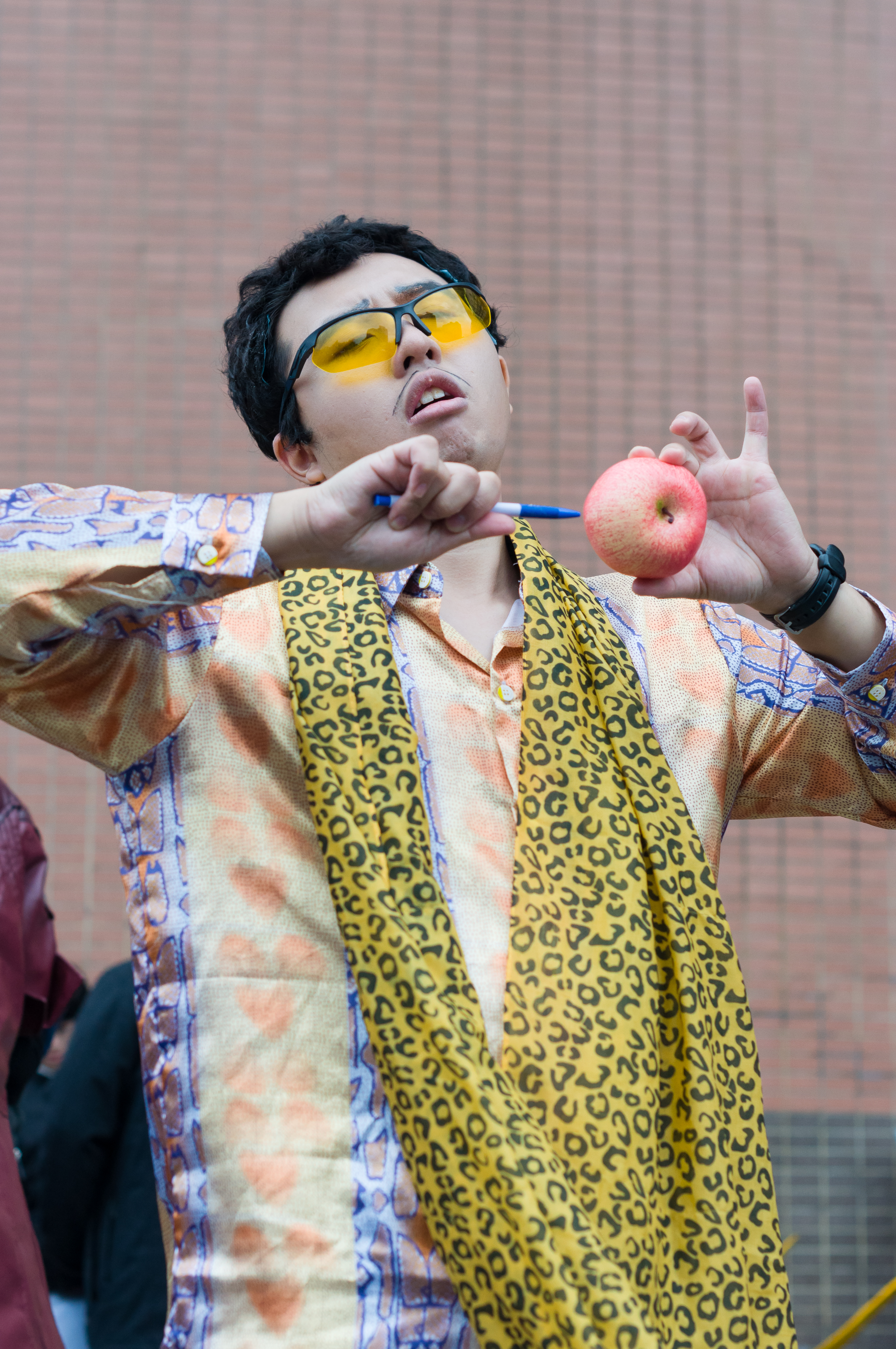 第44屆台灣同人誌販售會，Piko太郎cosplayer。